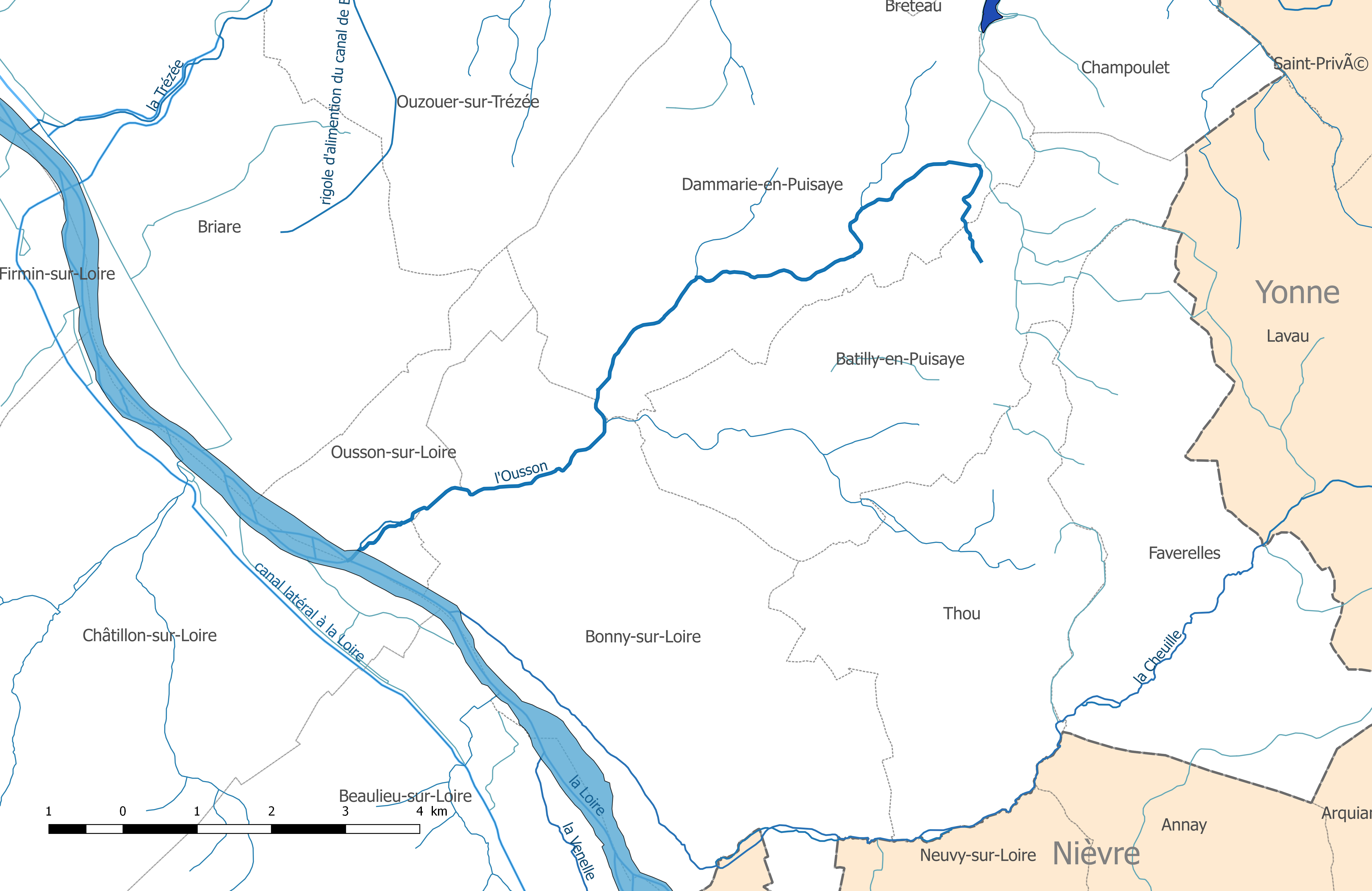 Carte du cours d'eau "l'Ousson" et de ses affluents, dans le département du Loiret.